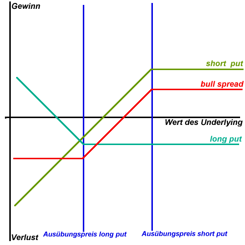 Bull spread mit puts.